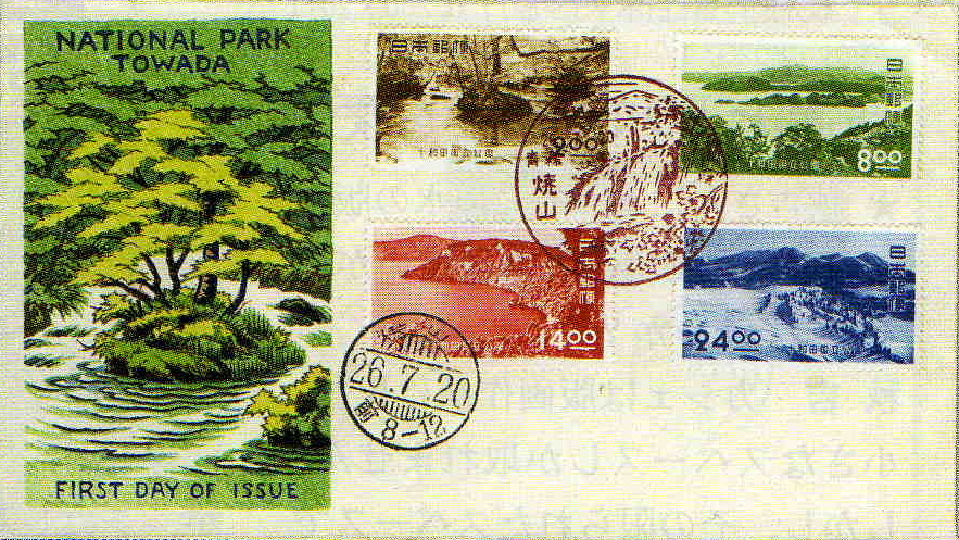 日本の十和田国立公園切手の初日カバー。渡辺木版画舗作成の通称「渡辺版」の初日カバー。発表より50年以上経過しており著作権上問題がない上、同様なものを複製するのは不可能である為、法的問題はない。